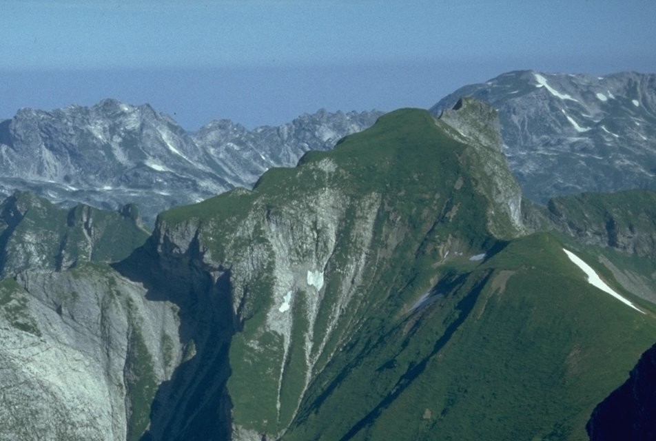 Schneck (2268 m) vom Großen Wilden, dahinter der Gratverlauf zum Großen Daumen (2280 m), über den der Hindelanger Klettersteig führt.